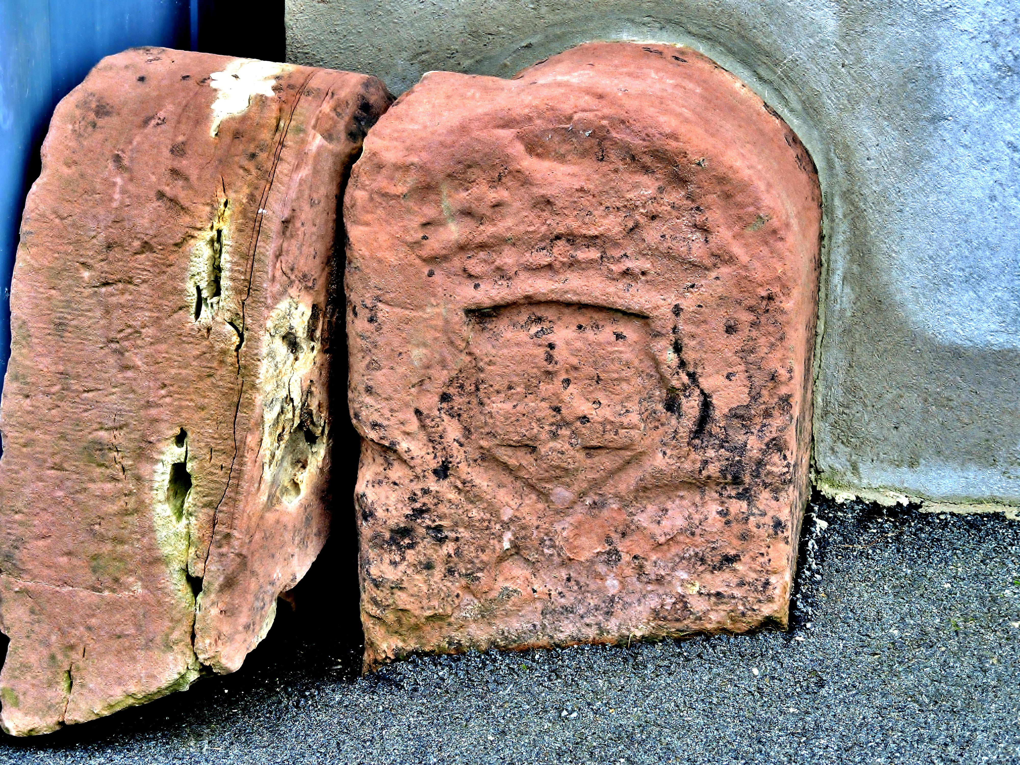 Bornes armoriées, au n° 16, grande rue, à Trévenans. Territoire de Belfort.